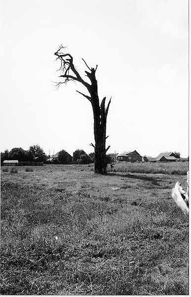 Pyhä puu Kurtshumin keskustassa. Paikalla oli ennen kylän uhrilehto, tämä puu on siitä jäänyt. Kyläläisten mukaan kuivunutta runkoa pitävät henget yhä pystyssä.